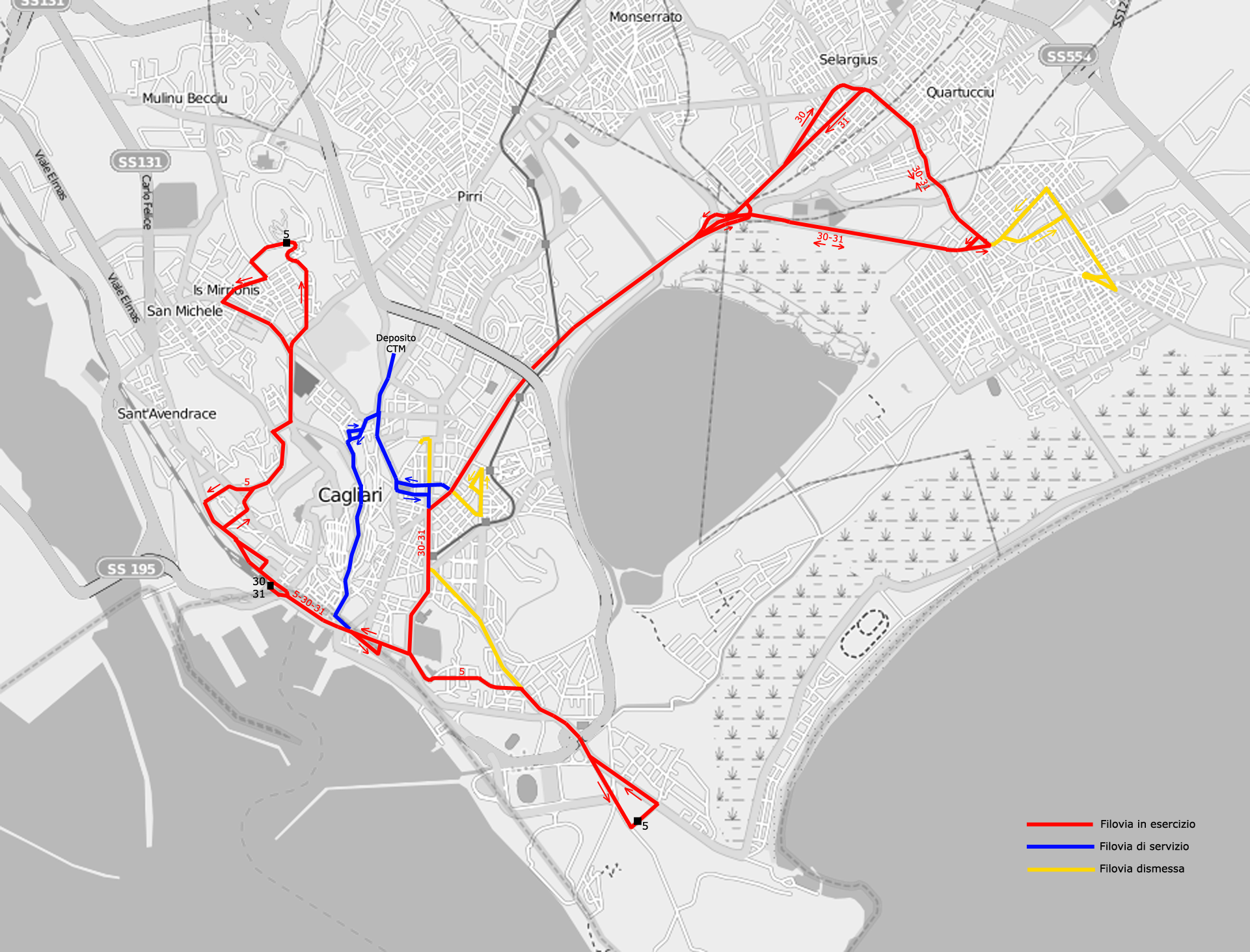 Opera creata e caricata dall'autore (own work by uploader). Background map form Openstreetmap (